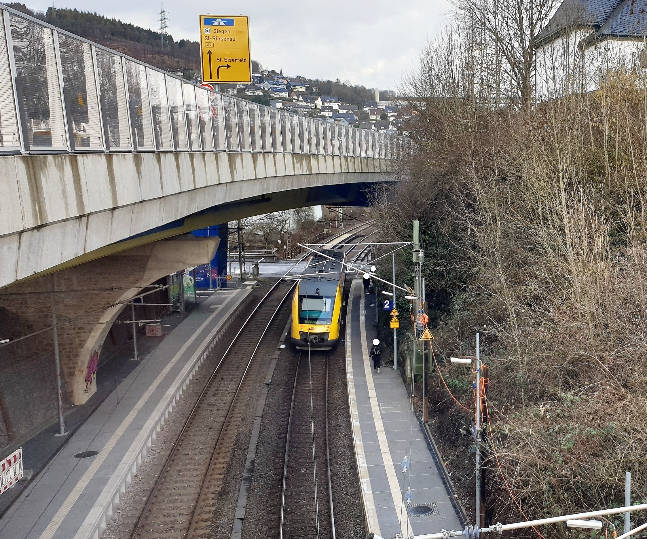 Haltepunkt Niederschelden Nord nach Sanierung, an der Siegstrecke gelegen